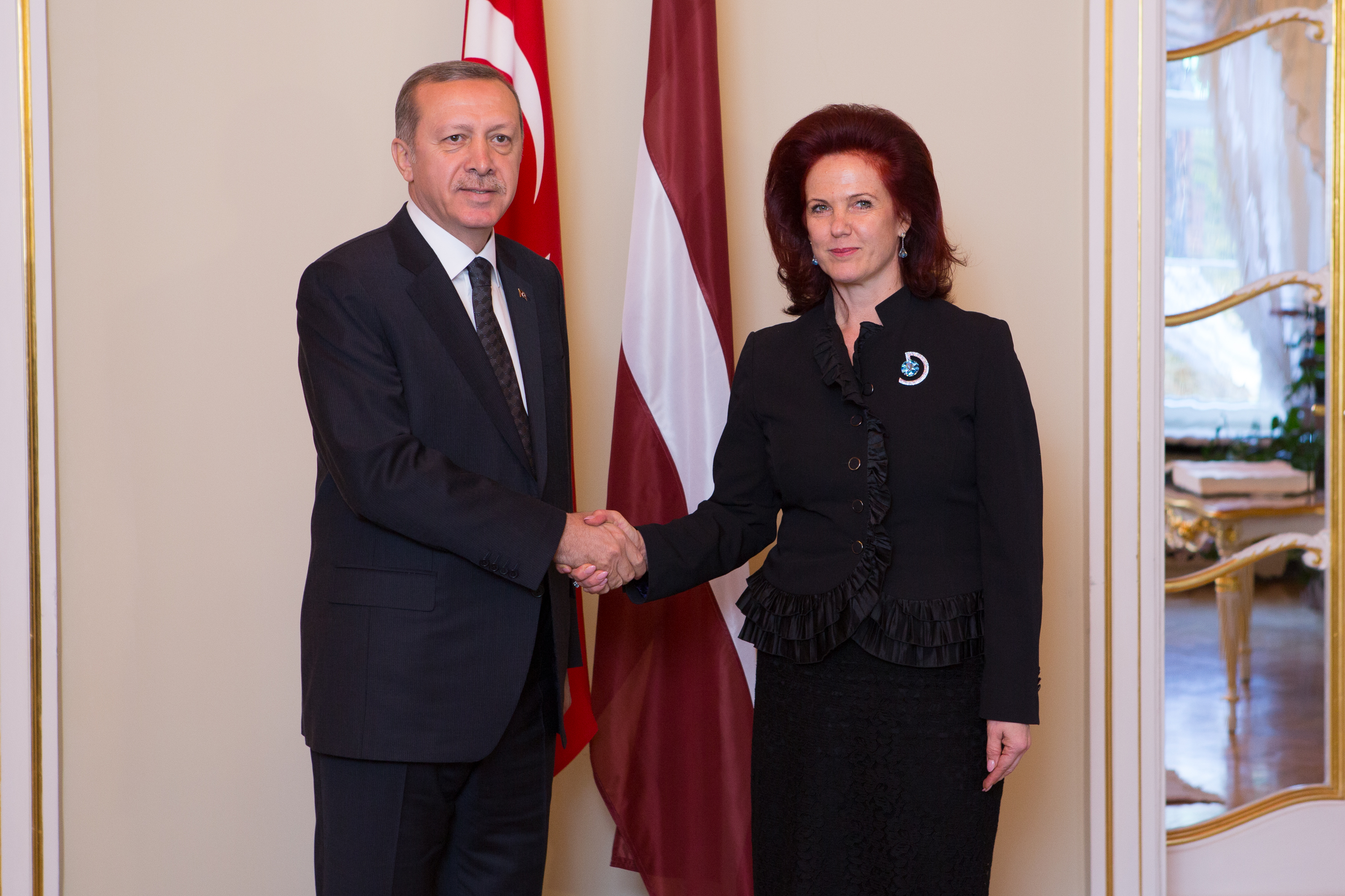 2014.gada 23.oktobris. Saeimas priekšsēdētāja Solvita Āboltiņa tiekas ar Turcijas Republikas prezidentu Redžepu Tajipu Erdoganu (Recep Tayyip Erdoğan). Foto: Ernests Dinka, Saeimas Kanceleja Izmantošanas noteikumi: saeima.lv/lv/autortiesibas October 23, 2014, Saeima Speaker Solvita Aboltina meets with the President of the Republic of Turkey, Recep Tayyip Erdoğan.